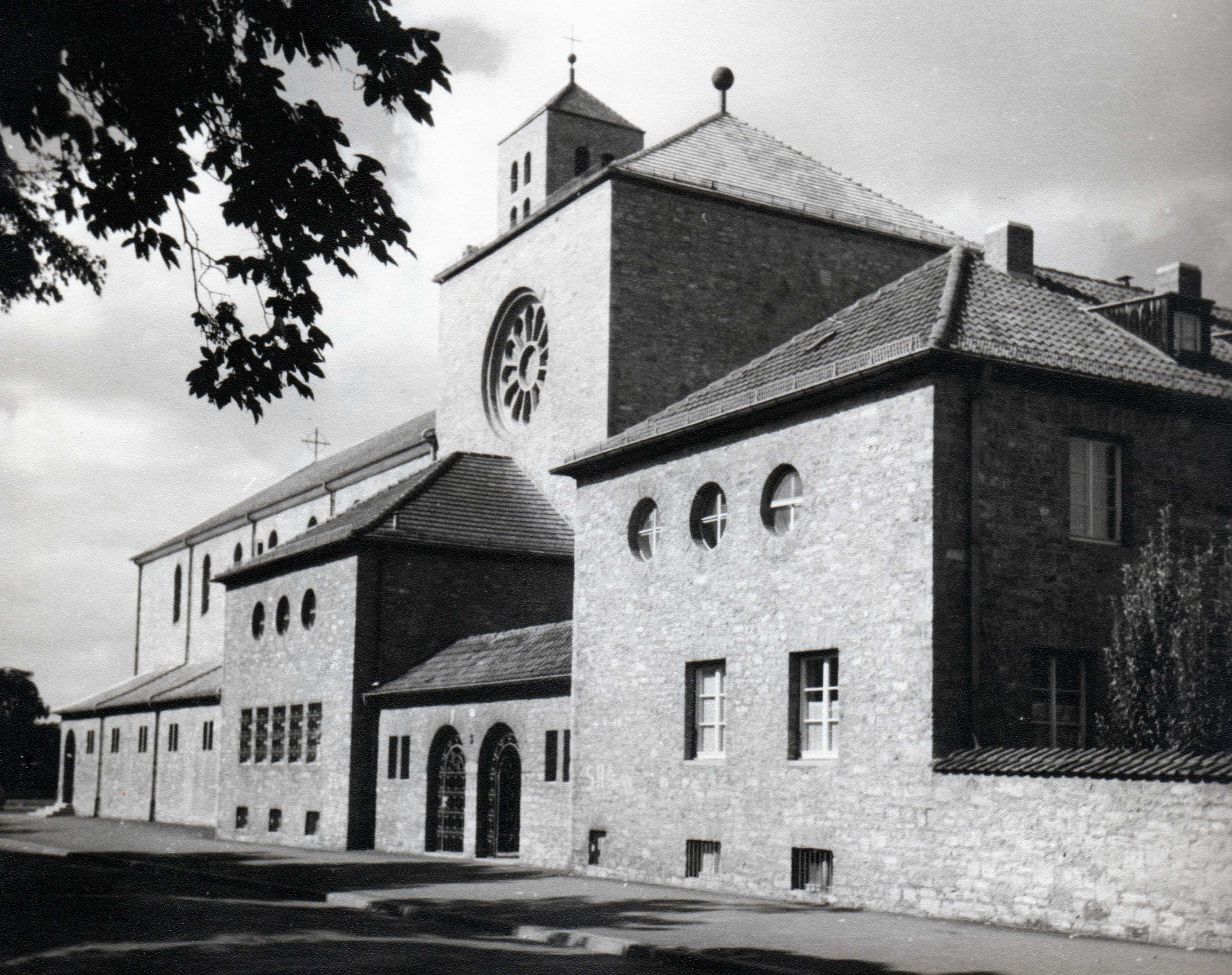 Pfarrkirche und Pfarrhaus von der Zu-Rhein-Straße aus